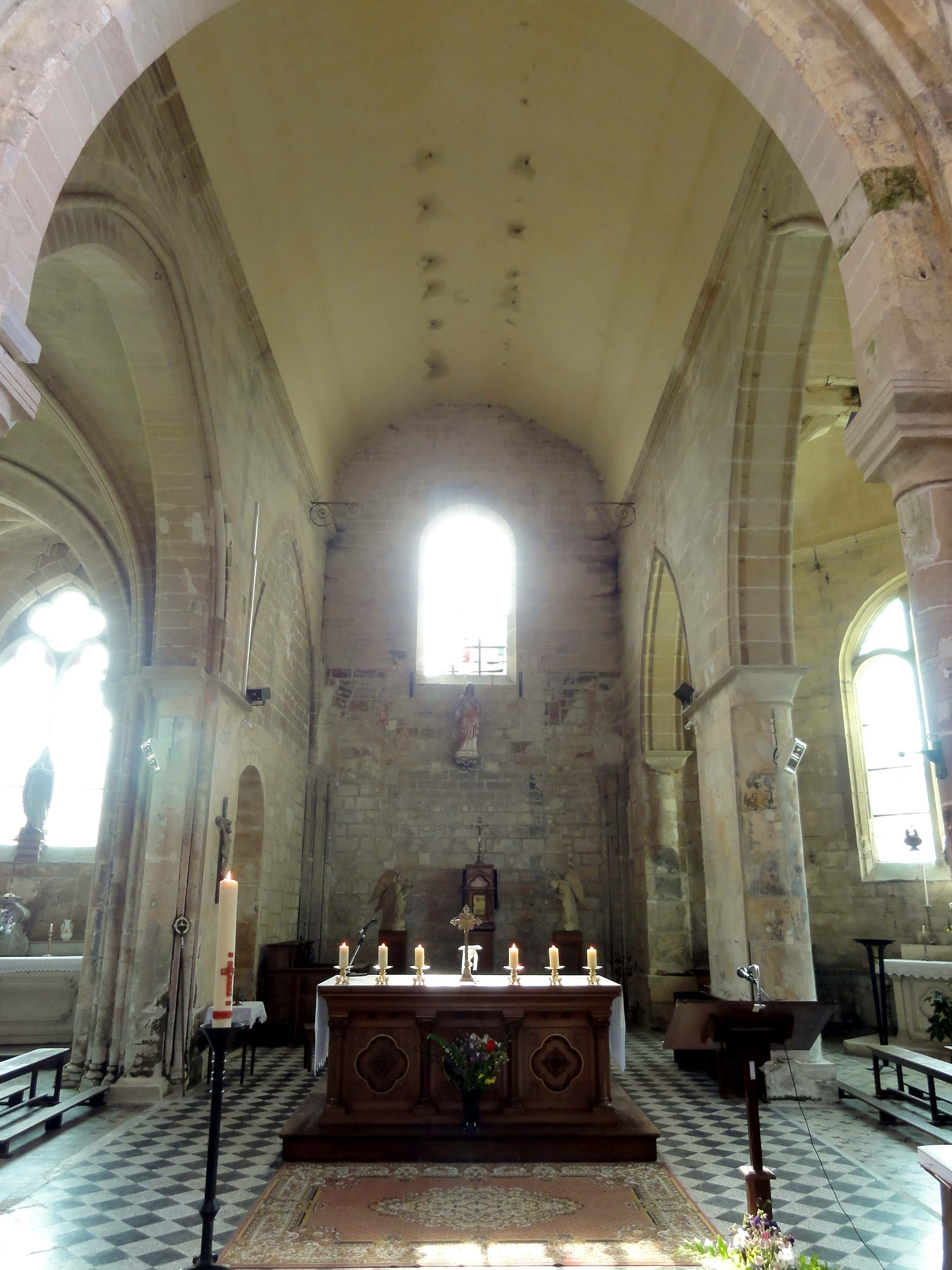 Intérieur de l'église Saint-Martin de Cires-lès-Mello (voir titre).